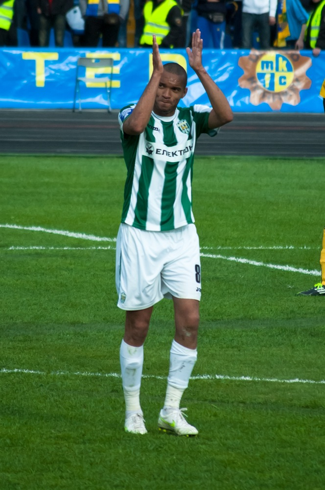 Вильям Роша Батиста — бразильский футболист.